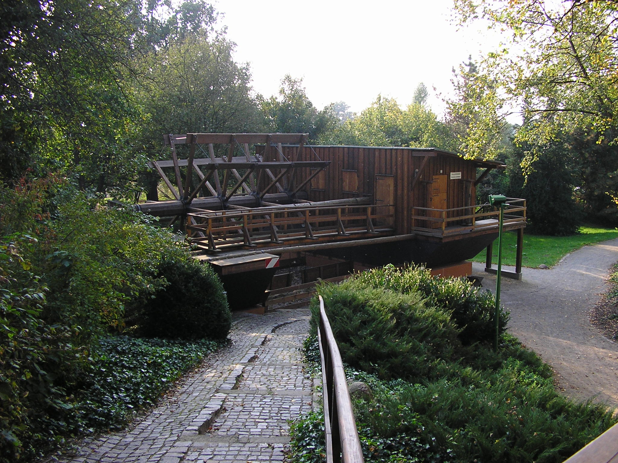 Die Schiffsmühle von Bad Düben The Shipmill by Bad Dueben